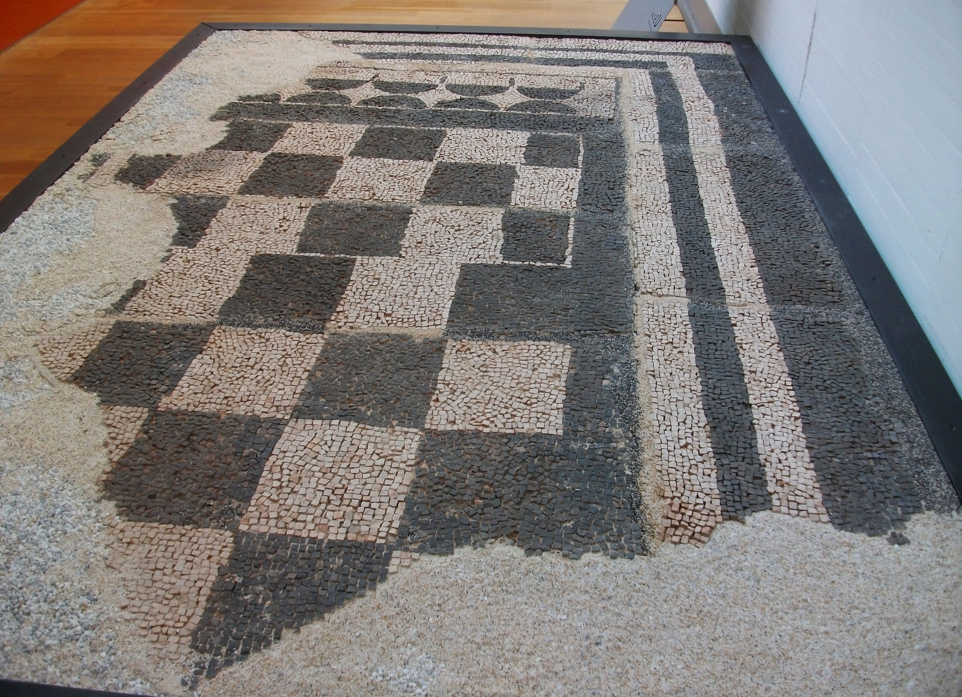 Mosaic romà de benicató (Nules), Museu de Belles Arts de Castelló.